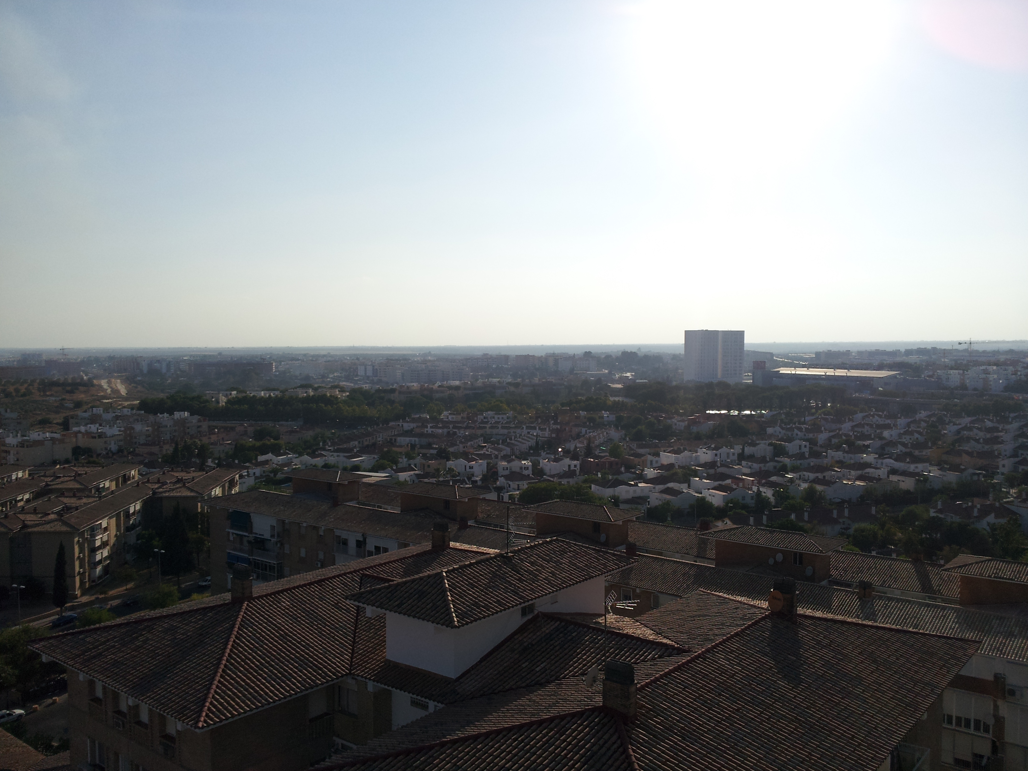 Urbanizaciones Ciudad Aljarafe, Los Alcores, Alboaire I, Los Olivos, Ciudad Expo, Centro Comercial Metro Mary centro de Mairena, fotografiadas desde la planta 15 del conjunto 16 de Ciudad Aljarafe